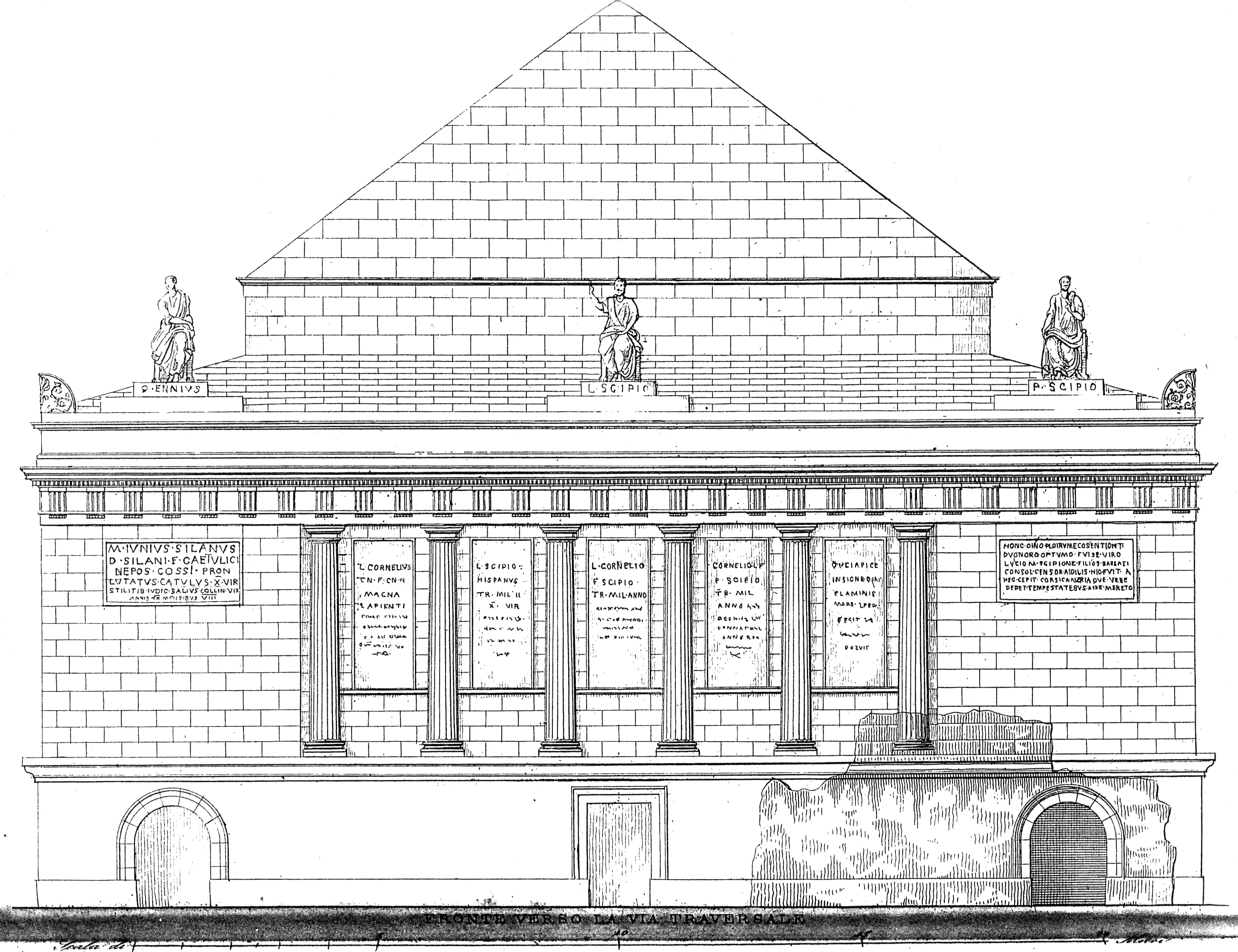 Rekonstruktion des Scipionengrabes